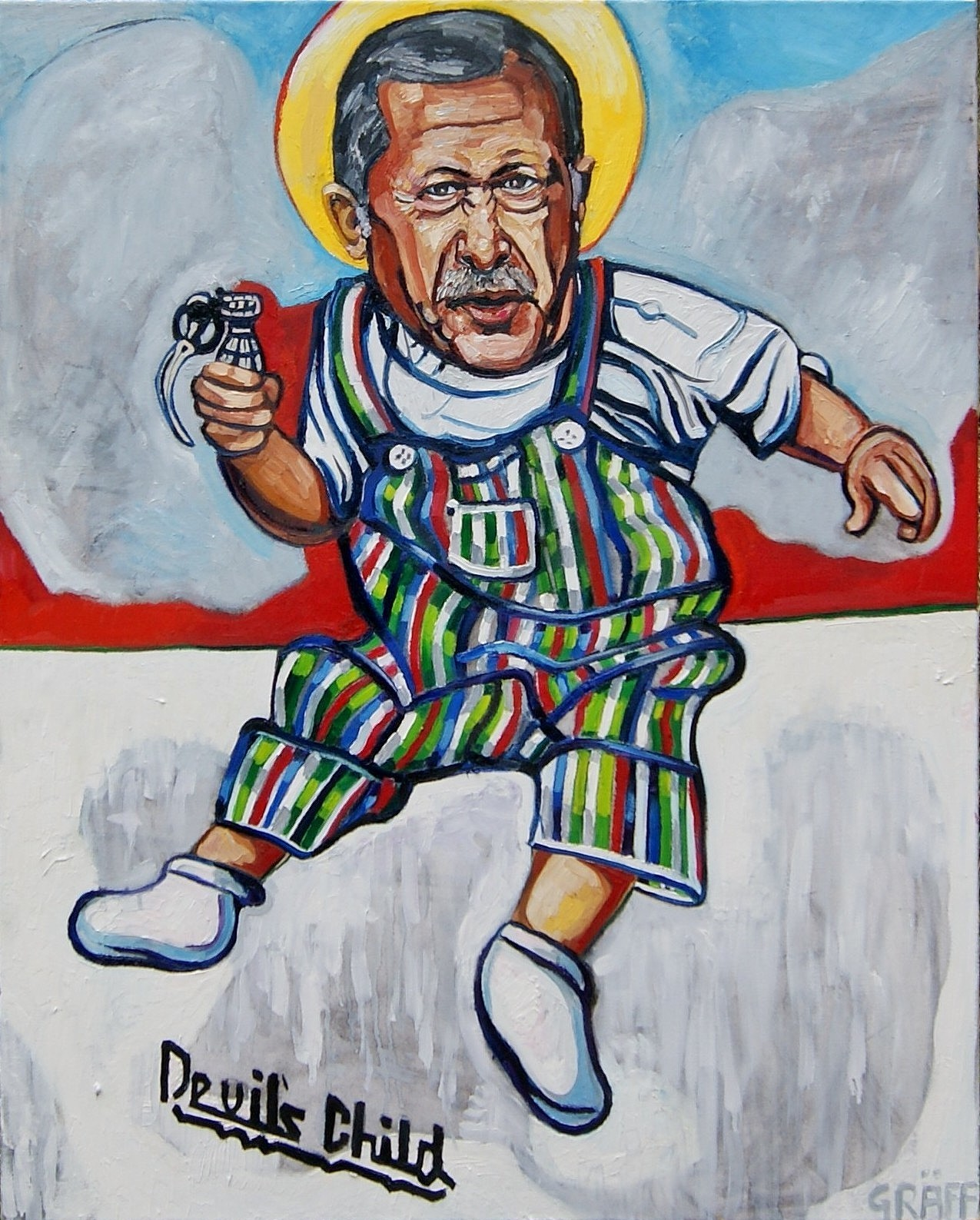 Matthias Laurenz Gräff, "Devils Child (Allegorie auf Erdoğan und dem gleichnamigen Song von Judas Priest)". Öl auf Leinwand, 100x80 cm, 2016